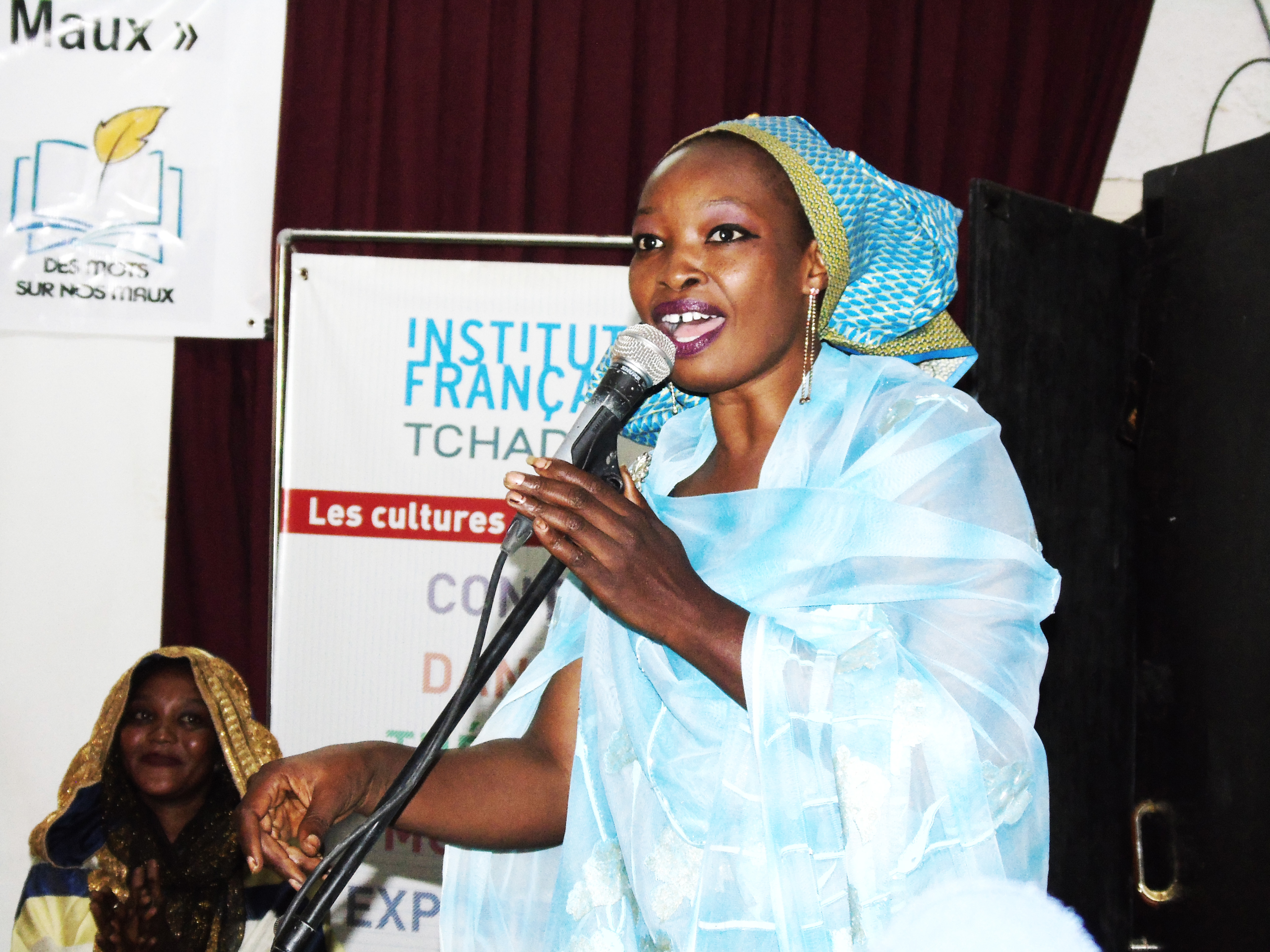 Mounira Mitchala au Concours littéraire "Des mots sur nos maux"